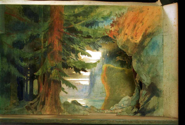 Bosc feréstec dalt de la roca de les valquíries Capvespre dels Déus, Wagner, Richard Fusta i paper Barcelona. Gran Teatre del Liceu, 16 de novembre de 1901 "MAE-Centre de Documentació i Museu de les Arts Escèniques"